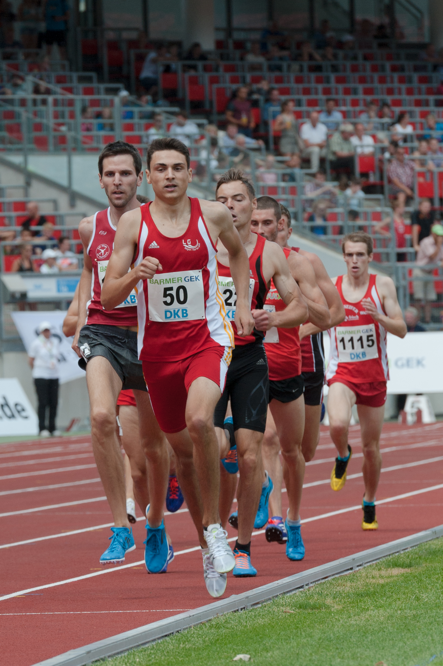 Deutsche Leichtathletik-Meisterschaften 2015: Männer 800m - Christoph Kessler, LG Region Karlsruhe